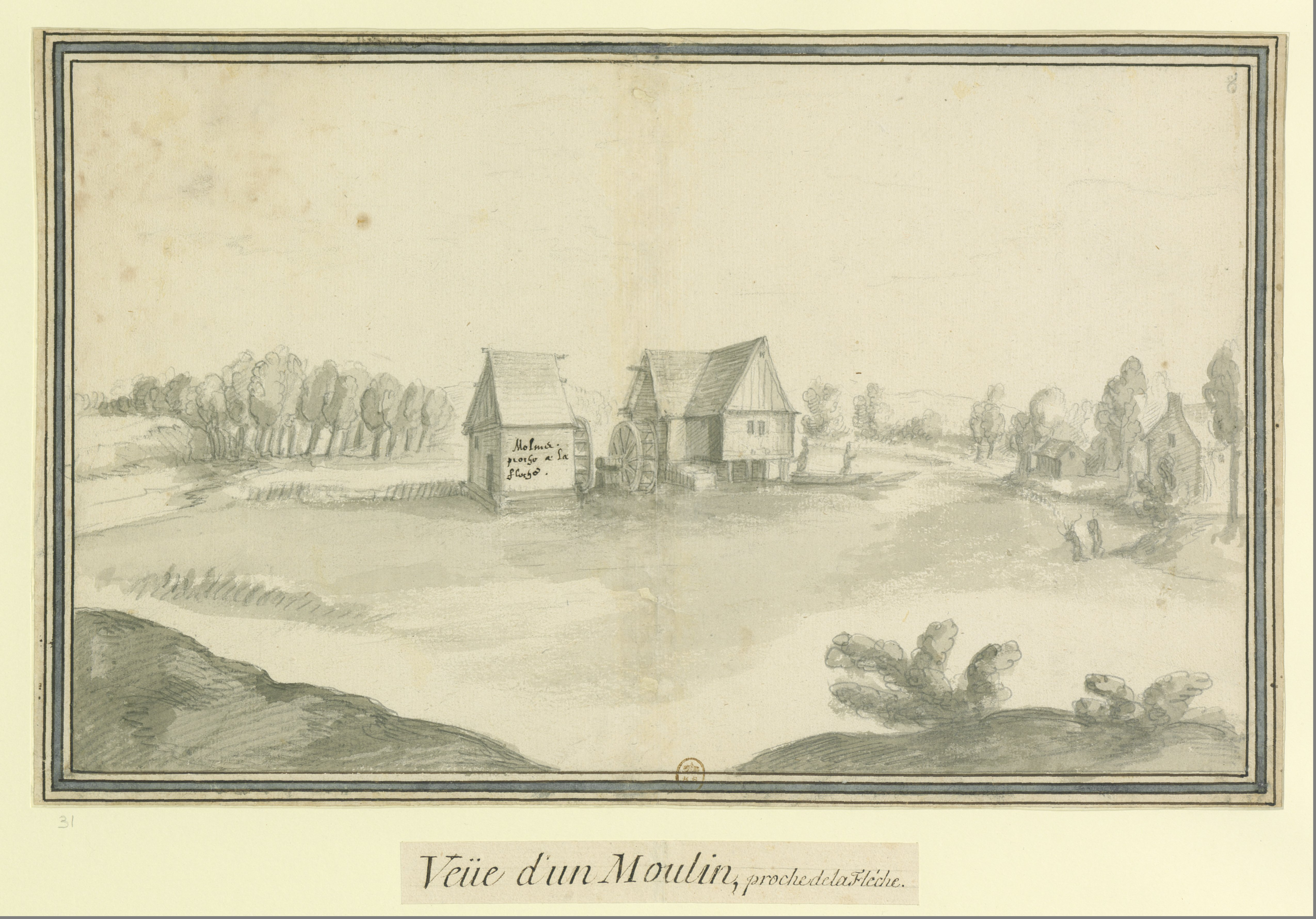 Le moulin de la Bruère à La Flèche, dessiné en 1612 par Étienne Martellange.